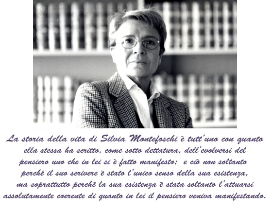 Silvia montefoschi O Vivente